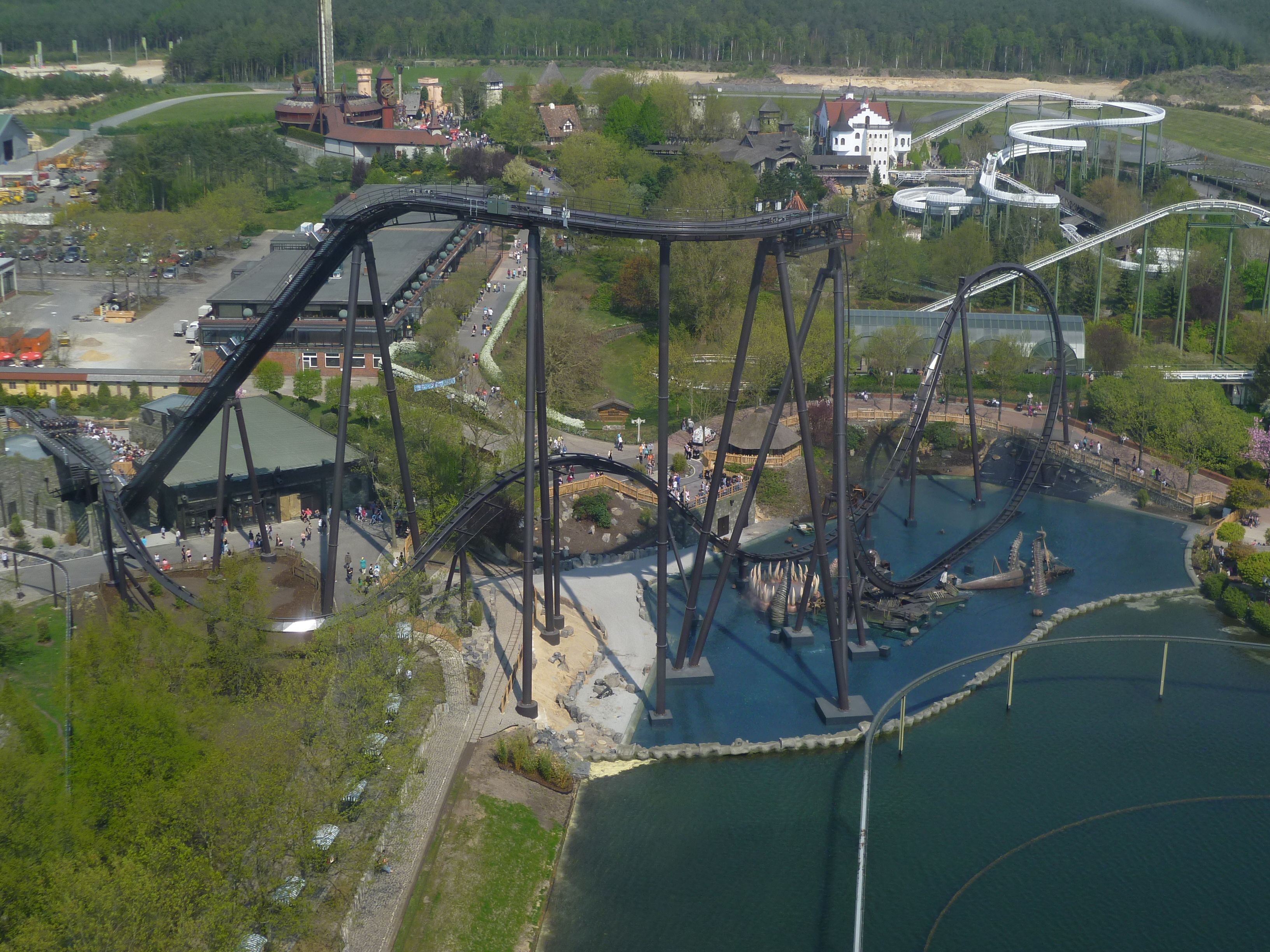 Gesamtansicht des Dive Coasters KRAKE